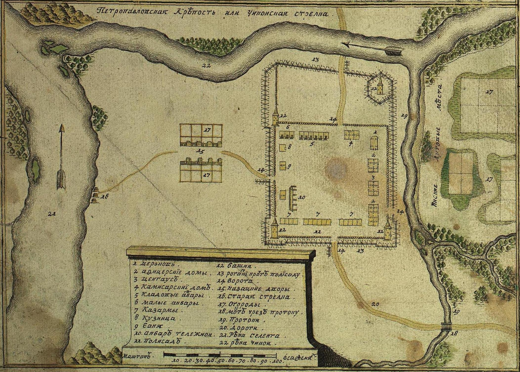 План Петропавлопской крепости (1720-1730 гг)